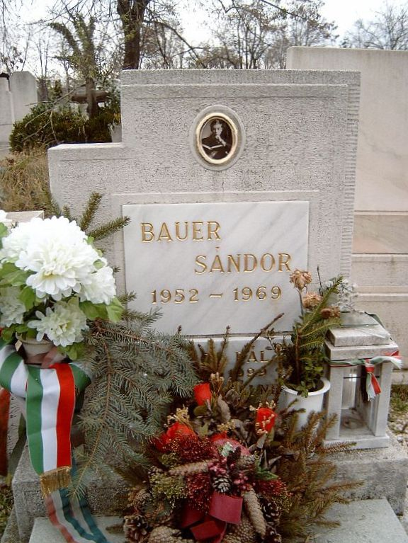 Bauer Sándor (Budapest, 1952. február 28. - Budapest, 1969. január 23.) autószerelő-tanuló, 1969. január 20-án a Nemzeti Múzeum kertjében felgyújtotta magát tiltakozásul a szovjet megszállás ellen. Rákospalotai temető: 18-0-6-41